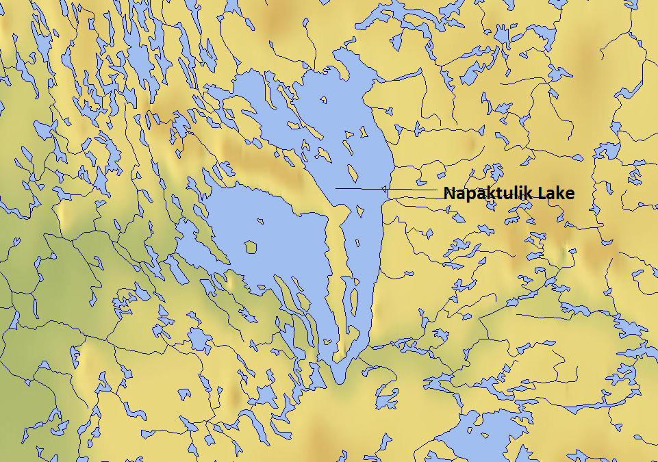 Napaktulik Lake, Canada